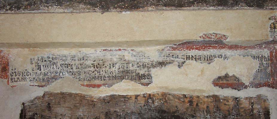 ктиторски натпис у цркви св. Петке у Станичењу